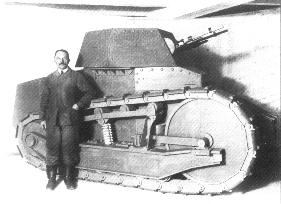 Digitale reproductie foto van de tweede maquette van de FT-17 tank